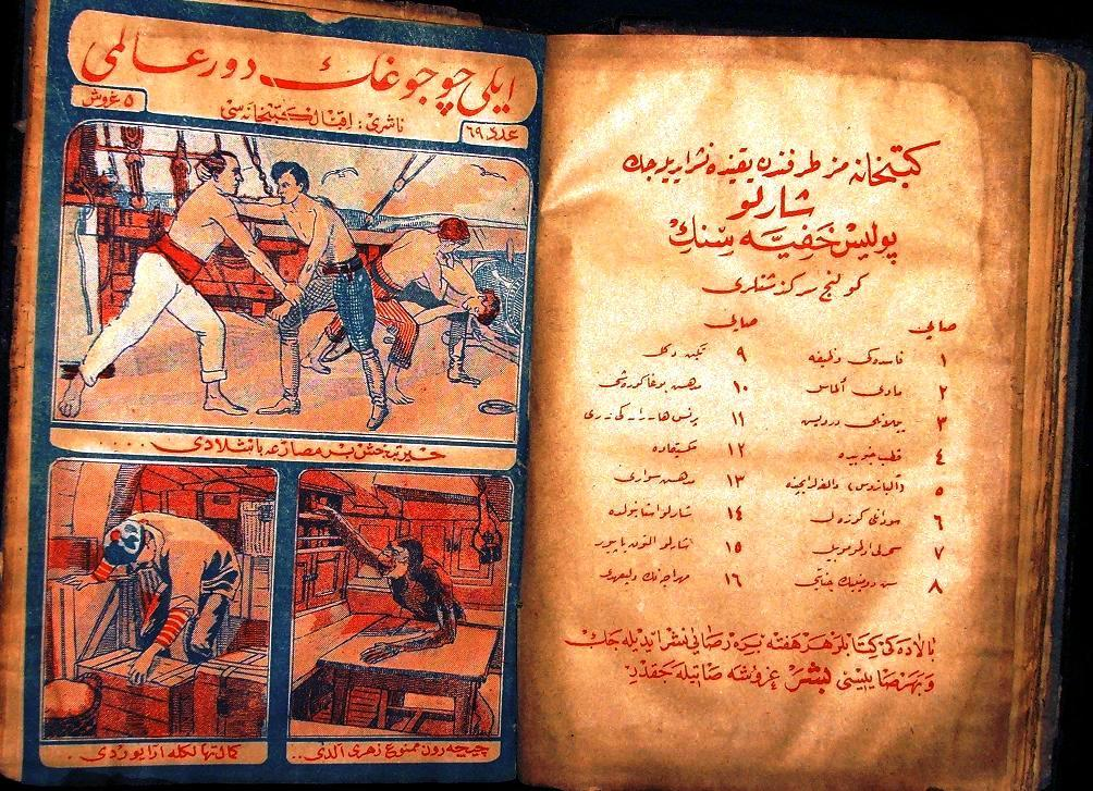 "İki Çocuğun Devrialemi" adlı çocuk kitabının bir sayfası. Jean de La Hire'in yazdığı ve ilk kez 1912'de Fransa'da yayımlanan ve özgün adı "Le Tour du monde de deux enfants" olan kitap kendi ülkesinde 71 fasikülde tamamlanmış, ayrıca birçok dergi ve gazetede de tefrika edilmişti. Türkiye'de ise Latin yazısına geçildiği Harf Devrimi öncesinde, 1924 (1342) yılında, Arap yazısıyla ve yine fasiküller halinde yayımlanmıştı. "İkbal Kütübhanesi" tarafından yayımlanan kitabın fasikülleri "Evkaf Matbaası"nda basılmıştır. Kitap fasikülleri otuzar sayfa ve 15,5x22,5 boyutlarındaydı.